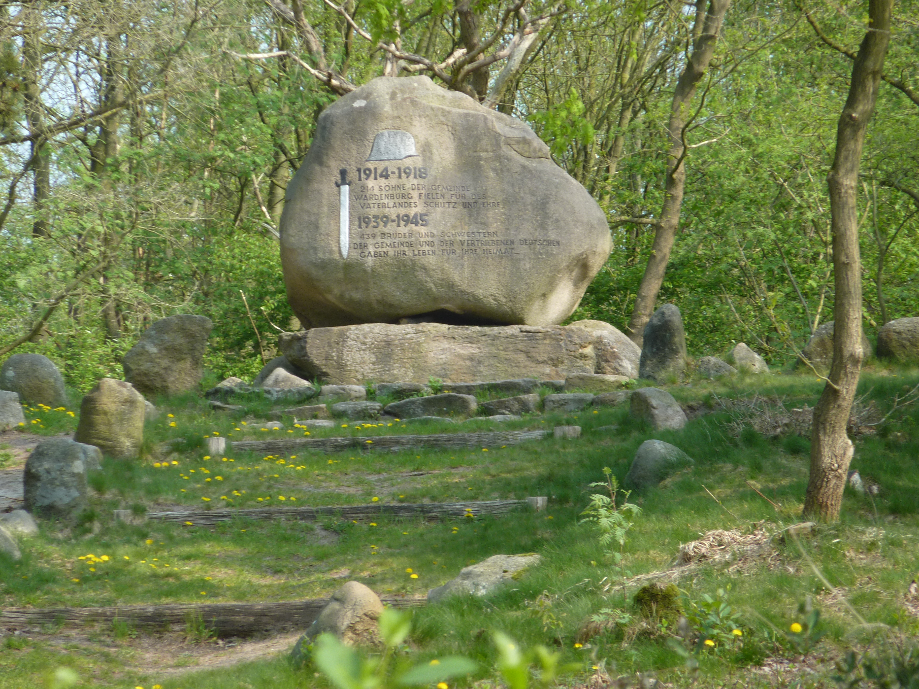 Gedenkstein auf dem Tillyhügel bei Wardenburg